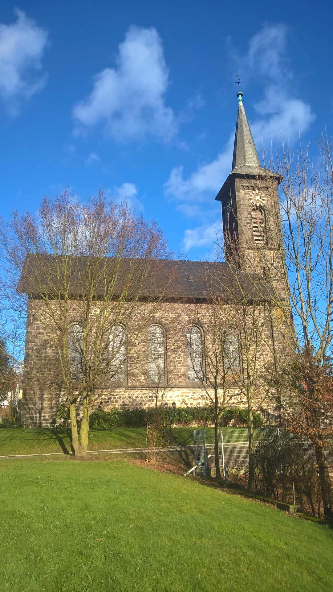 Evangelische Kirche Merlau, Gemeinde Mücke, Vogelsbergkreis, Hessen, Deutschland